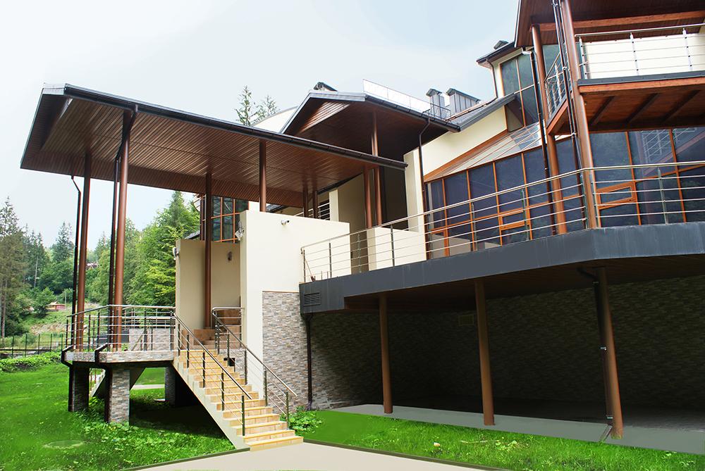 Спальний корпус санаторно-оздоровчого комплексу «Прикарпаття» НБУ в м. Яремче Івано-Франківської області (2008- 2012) (Котеджне містечко на 35 будинків по вул. Янева в м. Львові -2009-2016р. (у співавторстві з Д. В.Марченко)